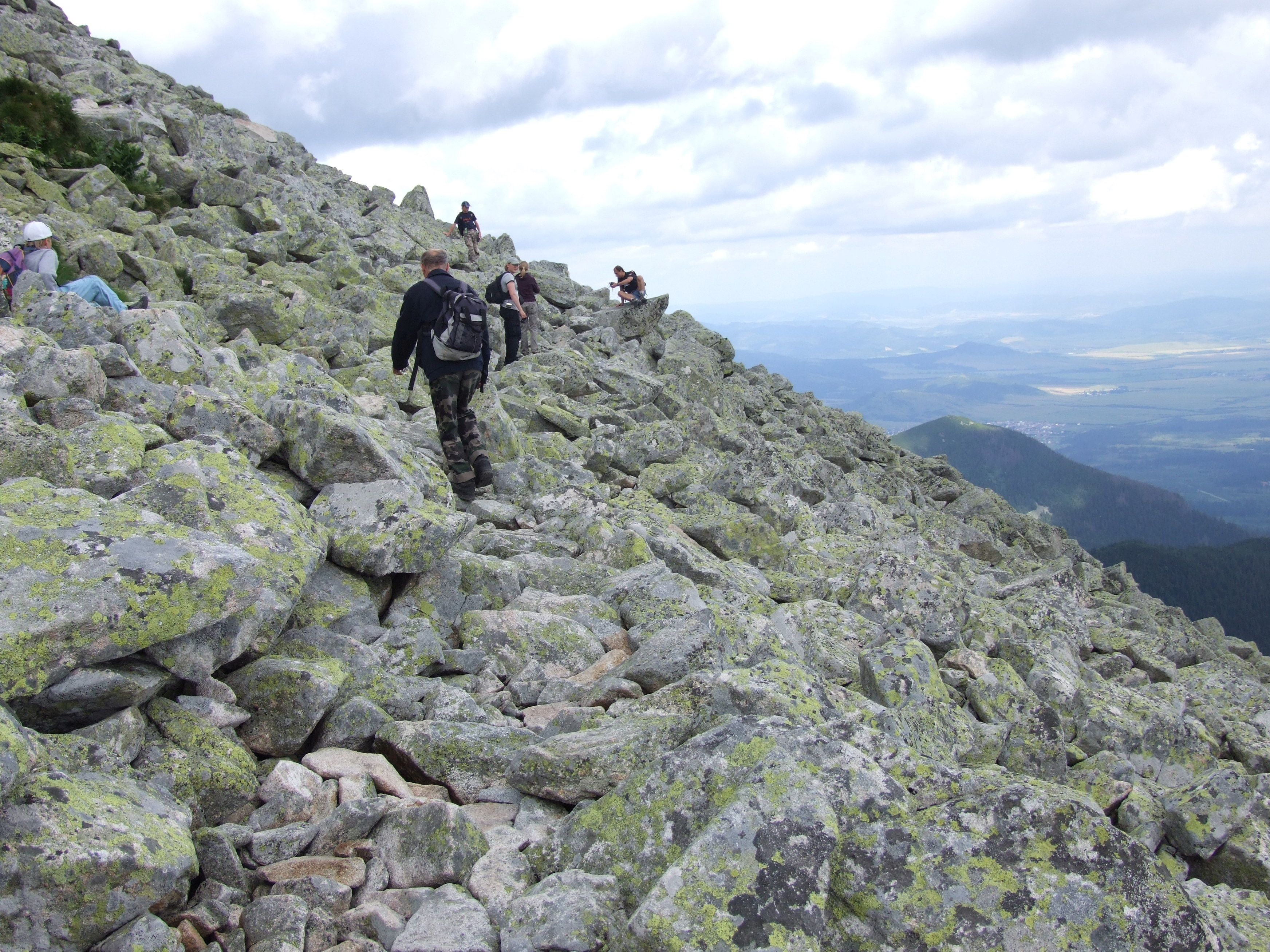 Jaszczerzyca